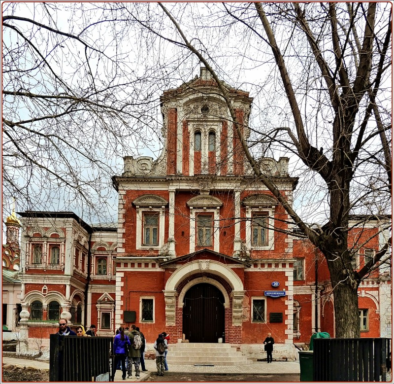 Фасад палат Аверкия Кириллова